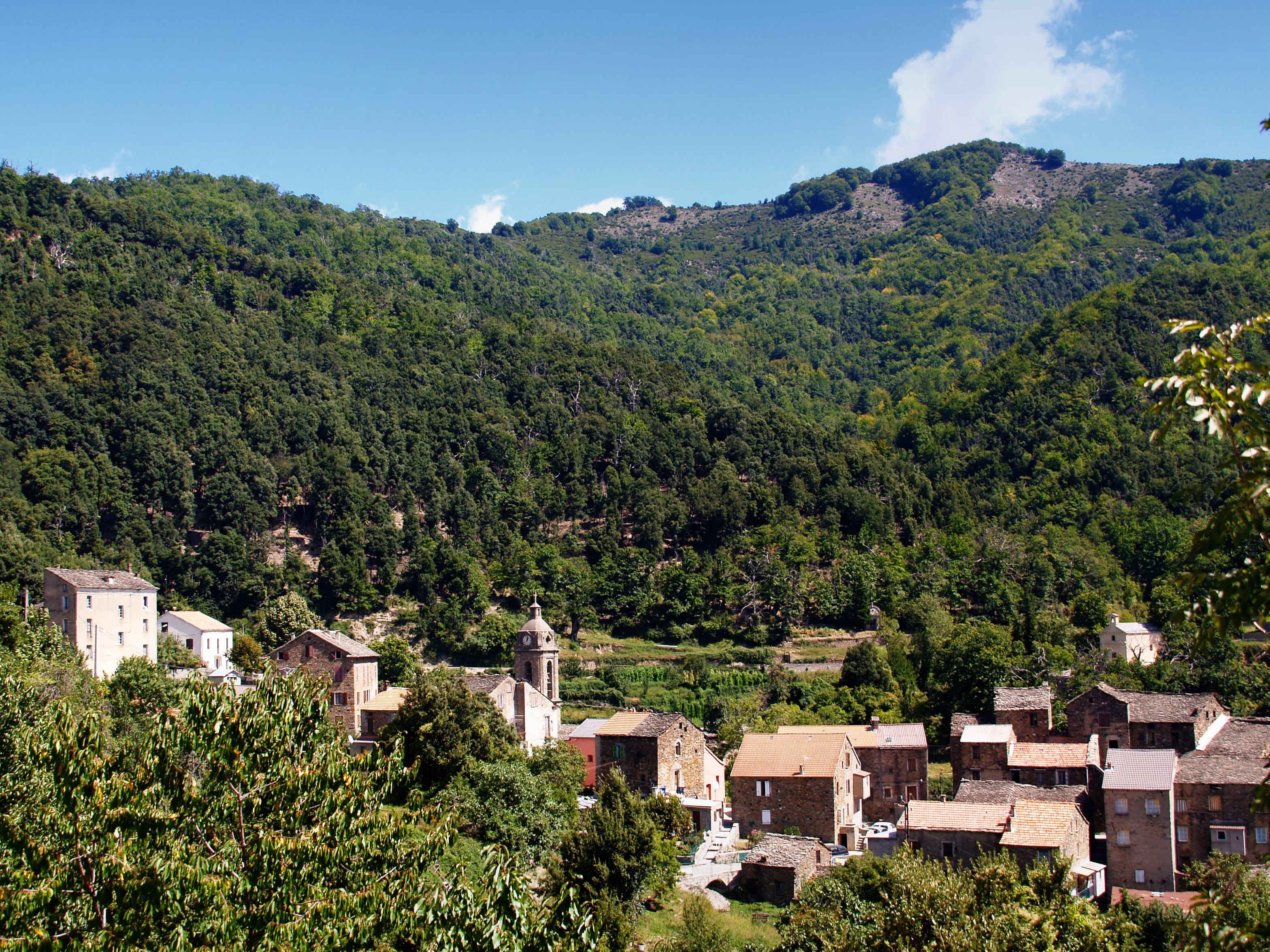 Bustanico (Corsica) - Vue du village